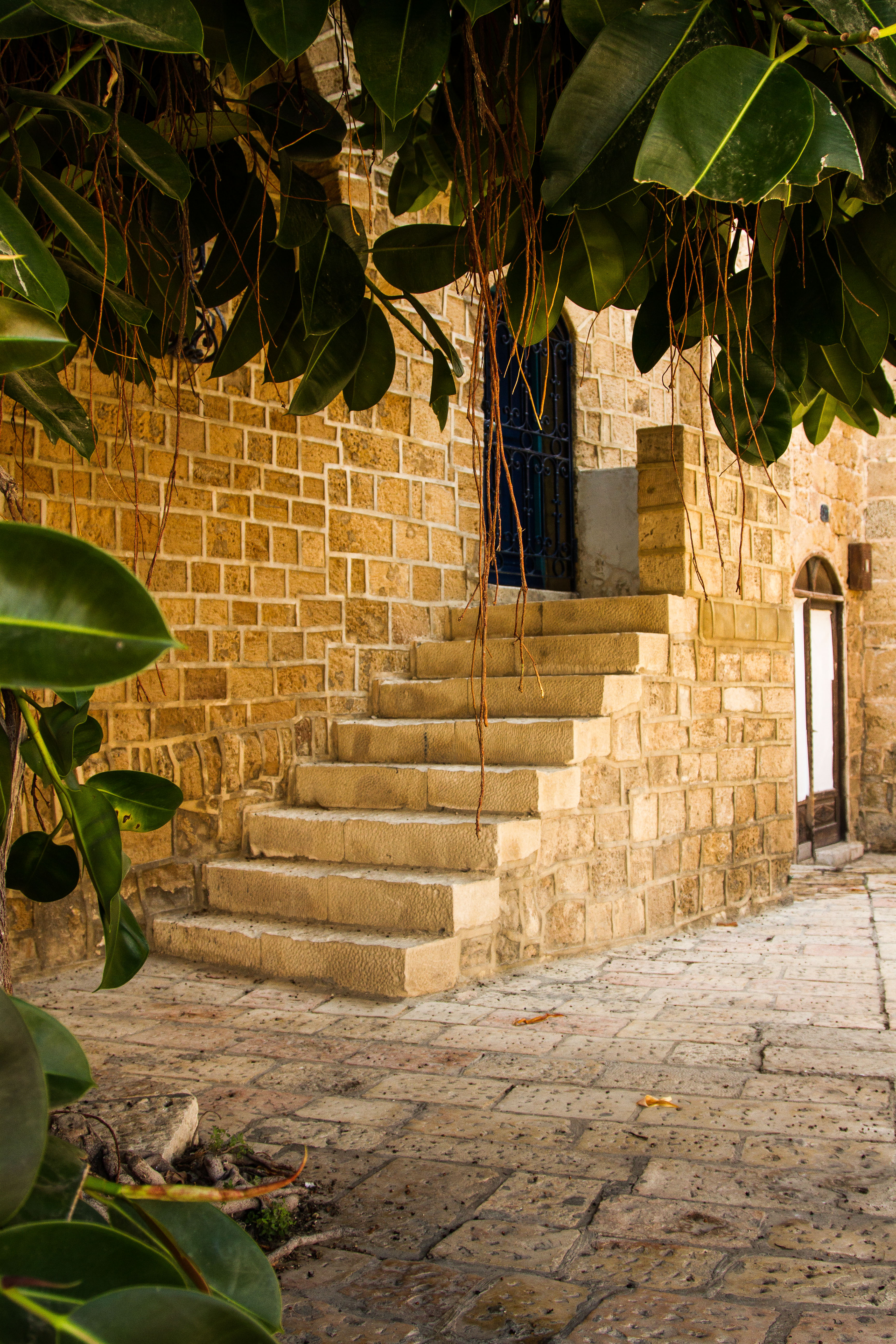 מתחם יפו העתיקה - יפו ההיסטורית, מוגדר כיום כשטח שהיה מוקף חומה במהלך המאה ה-19, מראש גבעת הכורכר של יפו ובמורד מדרונותיה, מרחוב יפת במזרח ובצפון ועד קרפיפי הנמל/הים במערב, ובדרום רחוב לואי פסטר.